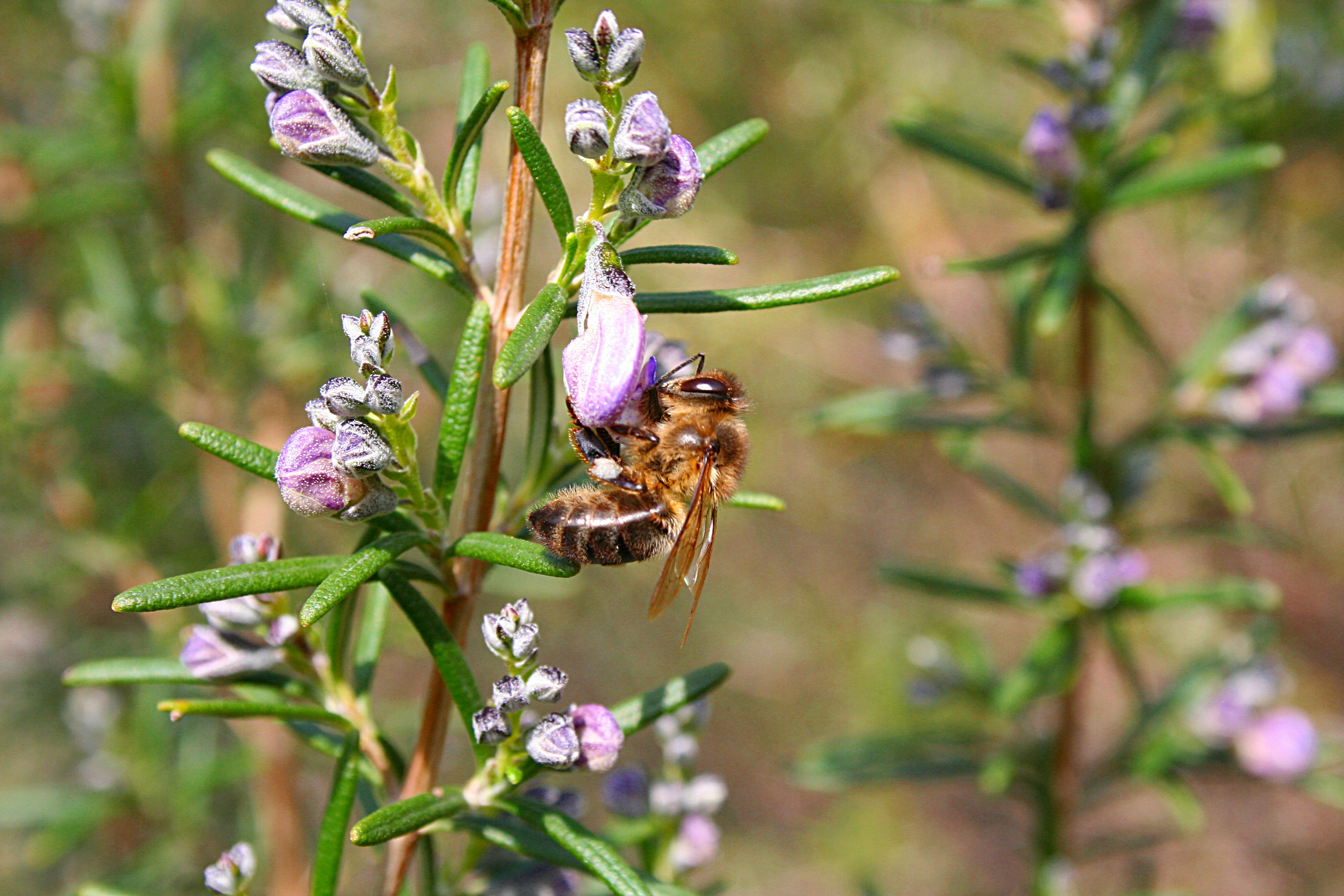 Abeja alimentándose de néctar en el Parque Nacional de Monfragüe, en Cáceres, España.